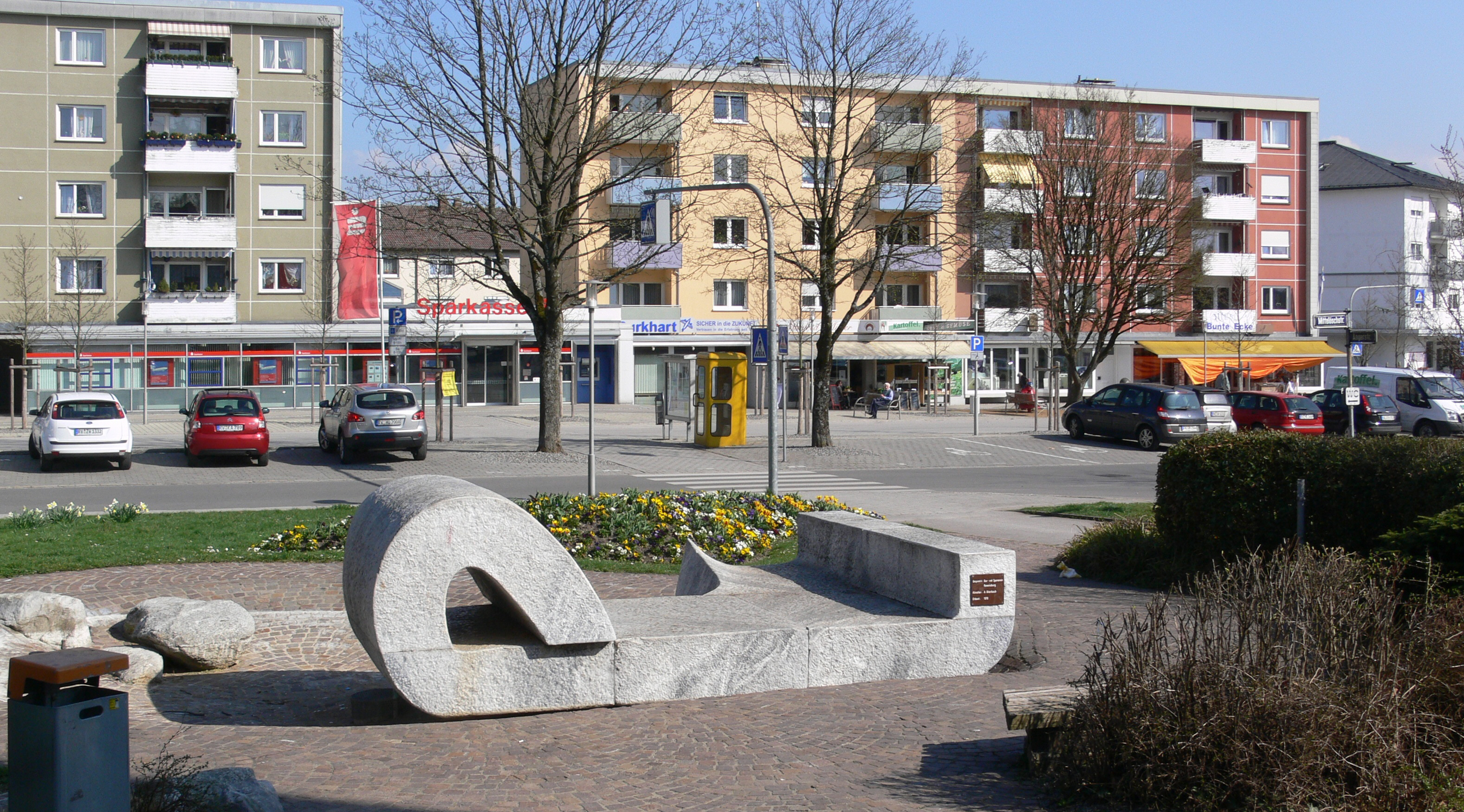 Ravensburg, Weststadt, Mittelöschplatz, Brunnen vor der Dreifaltigkeitskirche, 1979 von A. Otterbach